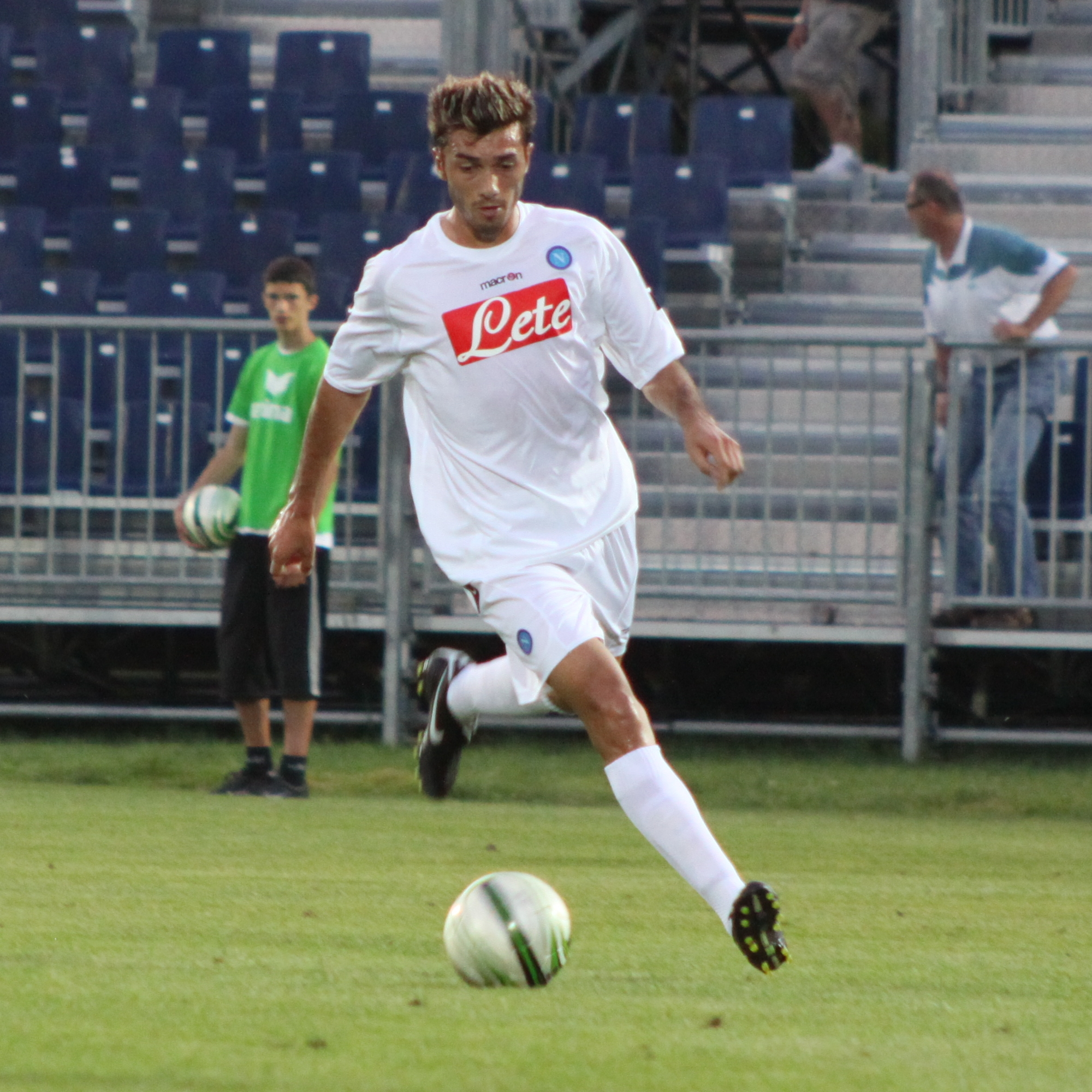 Jesús Dátolo - SSC Neapel (3) Jesús Dátolo - Società Sportiva Calcio Napoli